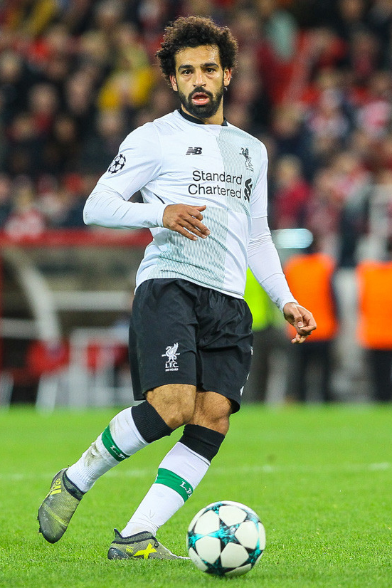 «Спартак» - «Ливерпуль»